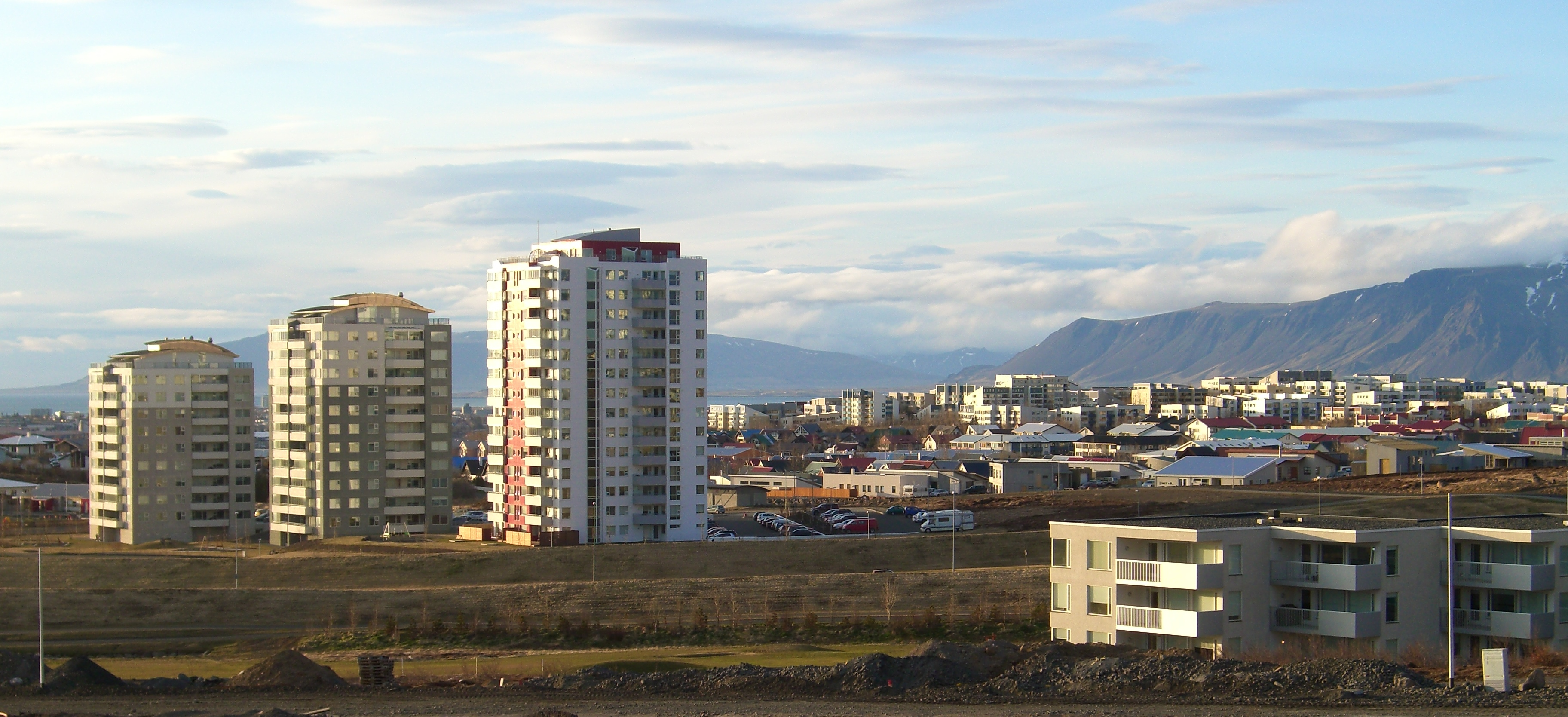 Suburban Reykjavík, Iceland.